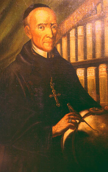 Gemälde: Der Benediktiner und Gelehrte Anselm Desing (1699-1772)